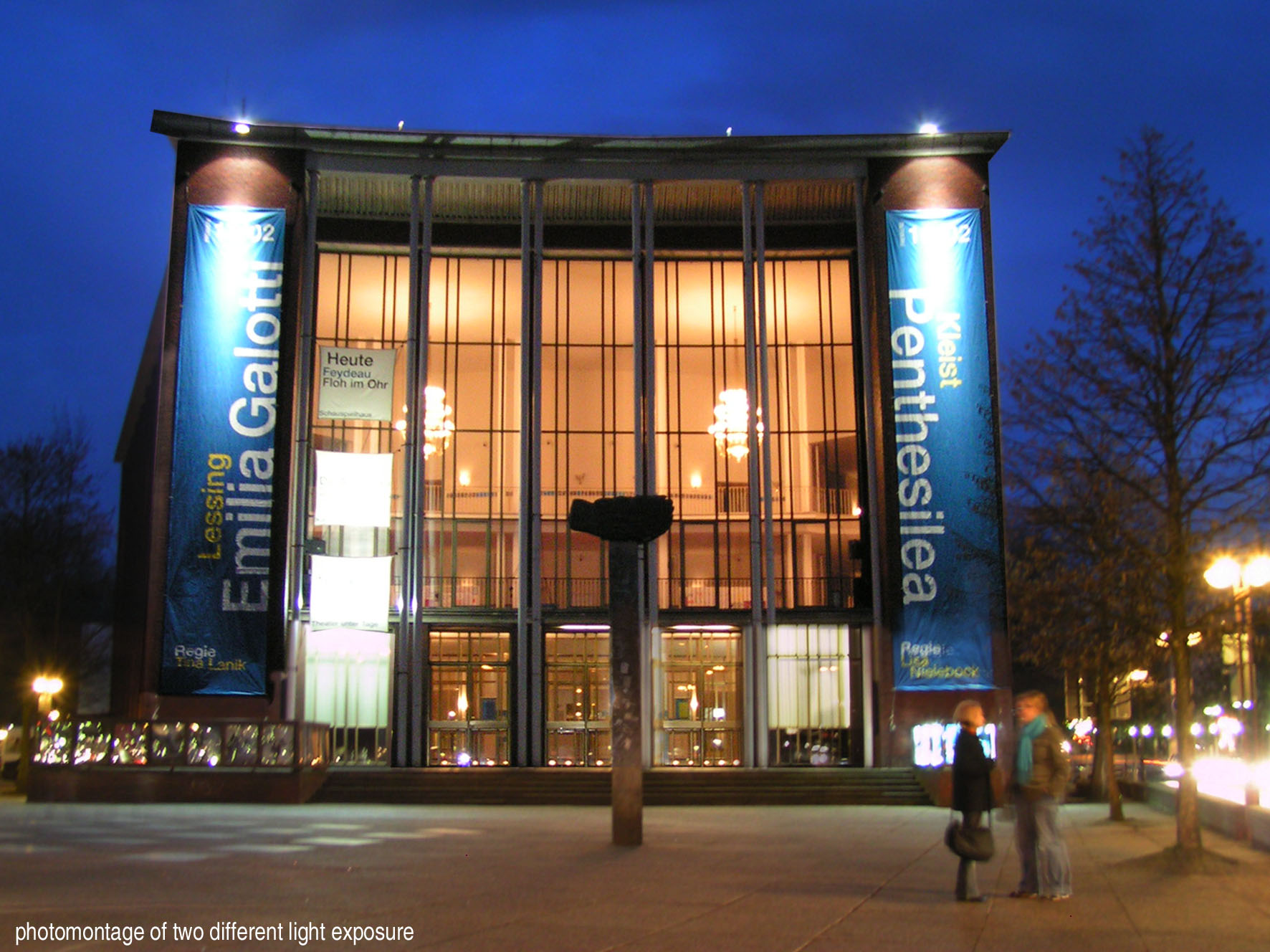 Das Schauspielhaus Bochum mit dem vorgelagerten Saladin-Schmitt-Platz bei Nacht; eine Montage aus zwei verschieden belichteten Bildern The theatre Schauspielhaus Bochum with Saladin-Schmitt-Square in front by night; a photomontage from two pictures Date: Feb 2007, Bochum, Germany Author: Maschinenjunge Licence: cc-by-sa-2.5